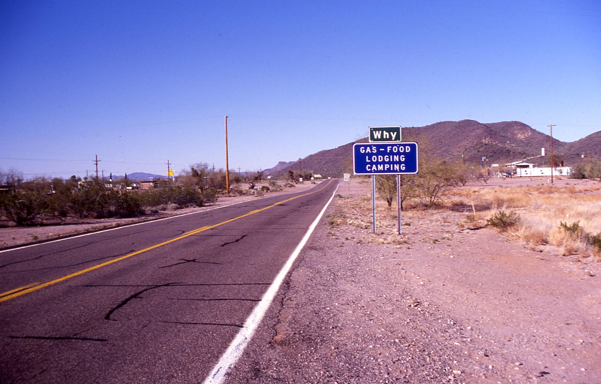 Ortseingang von im Pima County im Südwesten des US-Bundesstaates Arizona.